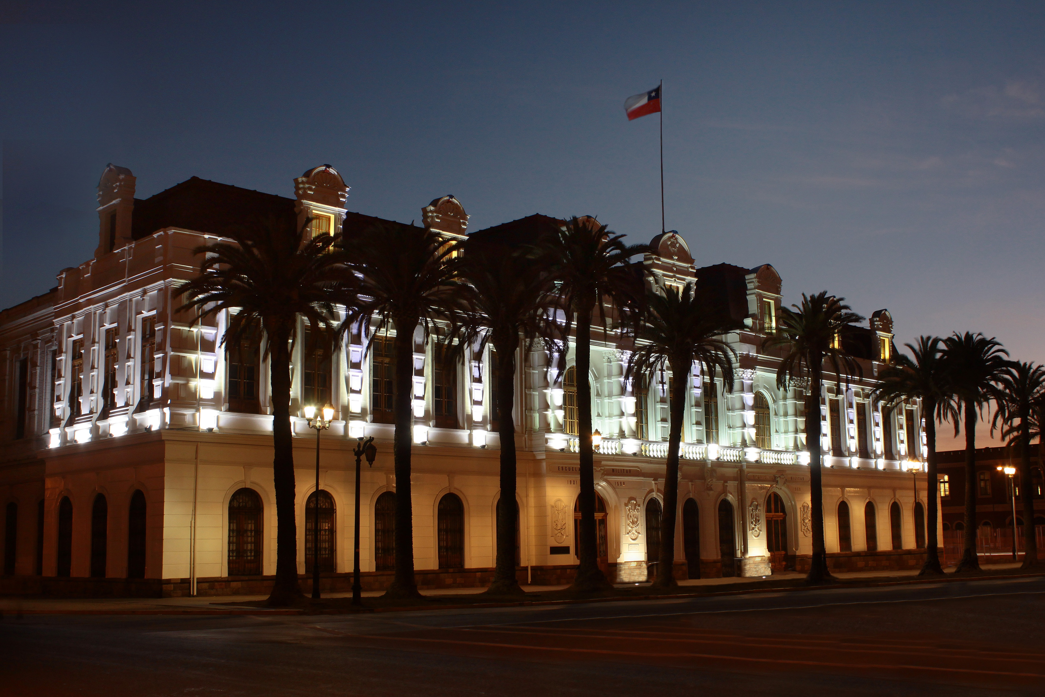 Antigua Escuela Militar This is a photo of a national monument in Chile: 213